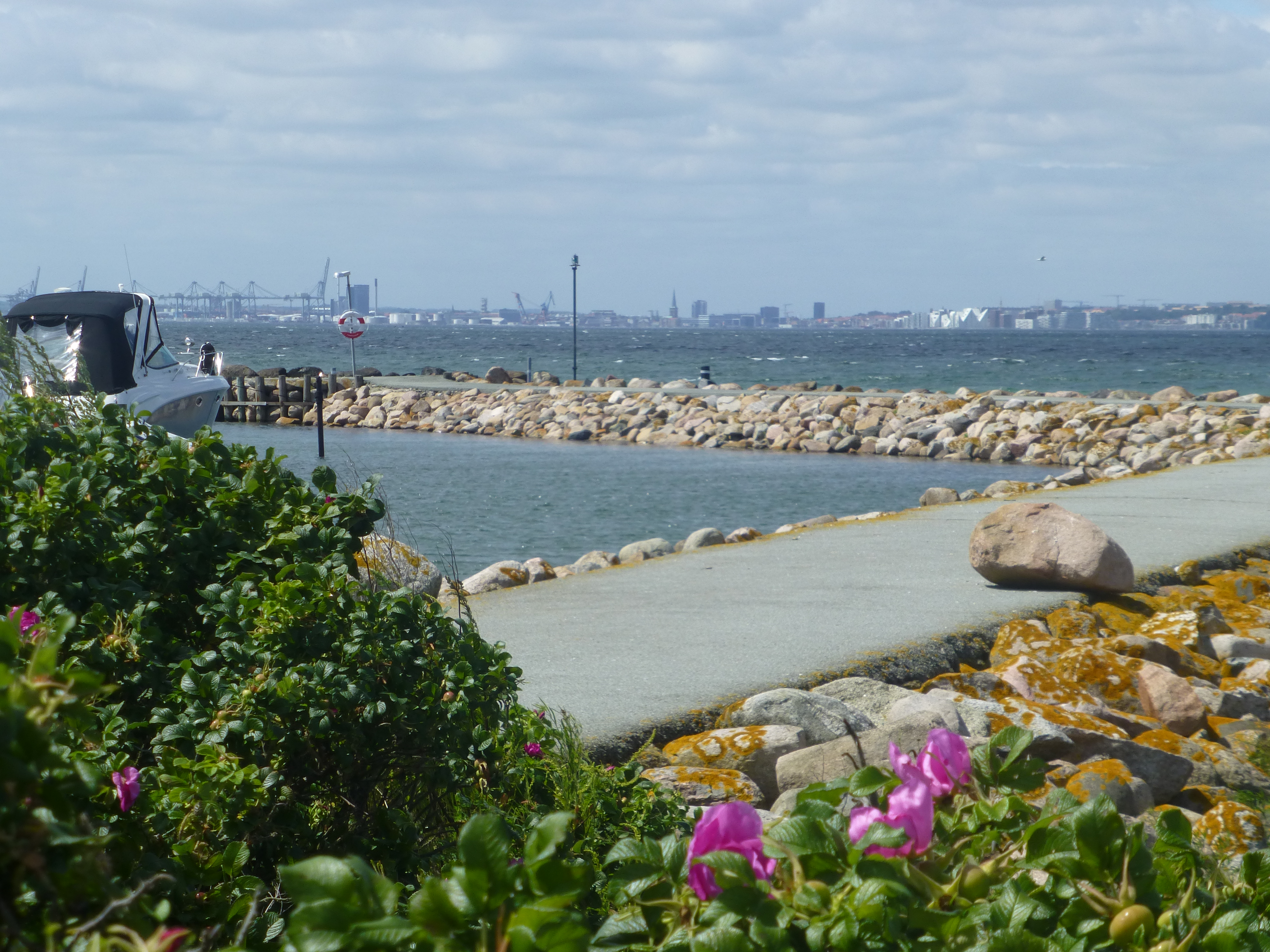 Aarhus set fra Lystbådehavnen ved Skødshoved Bro